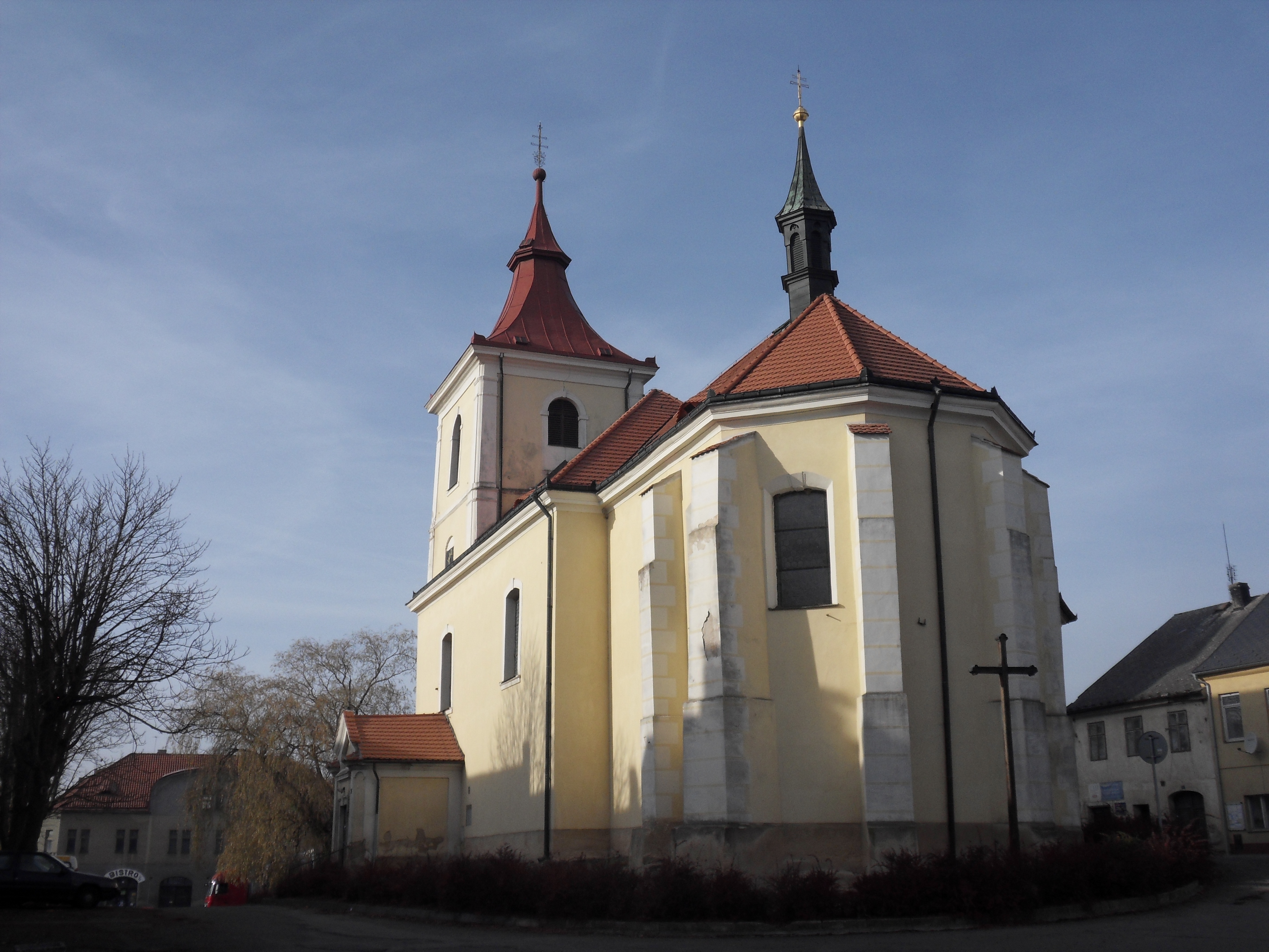 Kostel sv. Jana Křtitele, na náměstí v Mýtu, okr. Rokycany